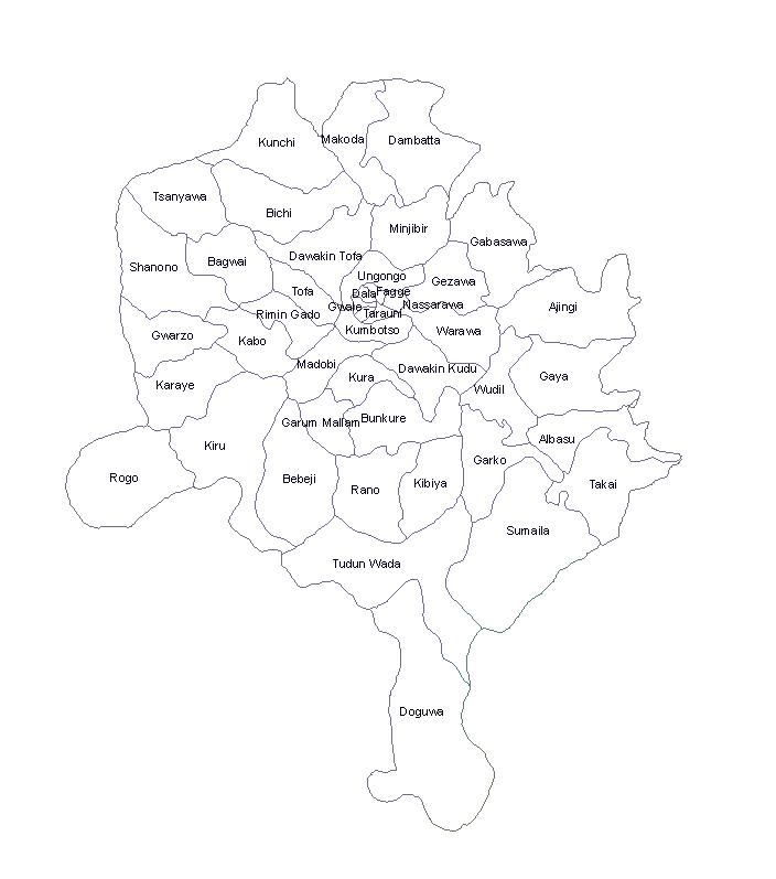 mapa de las 44 LGA del Estado de Kano, Nigeria